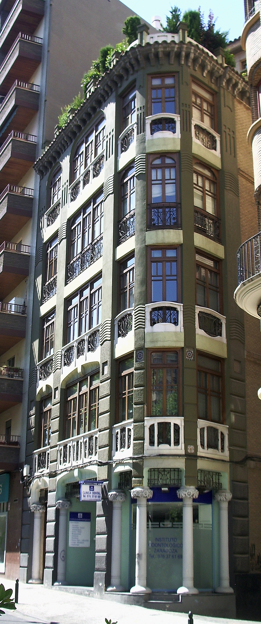 Edificio modernista llamado "Casa Palao" del Paseo de Sagasta nº 76 (Zaragoza, España). Arquitecto: Miguel Ángel Navarro Pérez. Año: 1912.